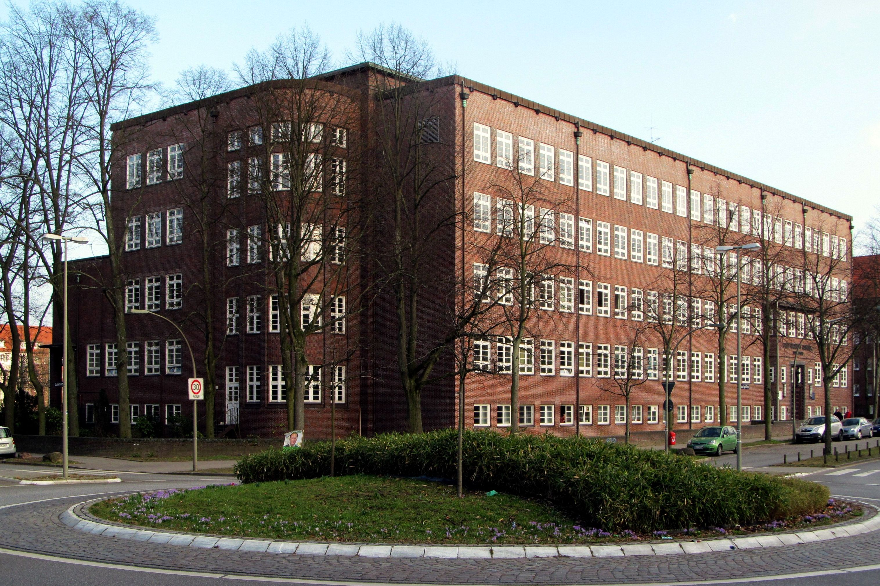 Ehemalige Oberrealschule für Mädchen in Hamburg-Hamm, jetzt Ballettzentrum Hamburg, erbaut 1929/30 von Fritz Schumacher This is a photograph of an architectural monument.